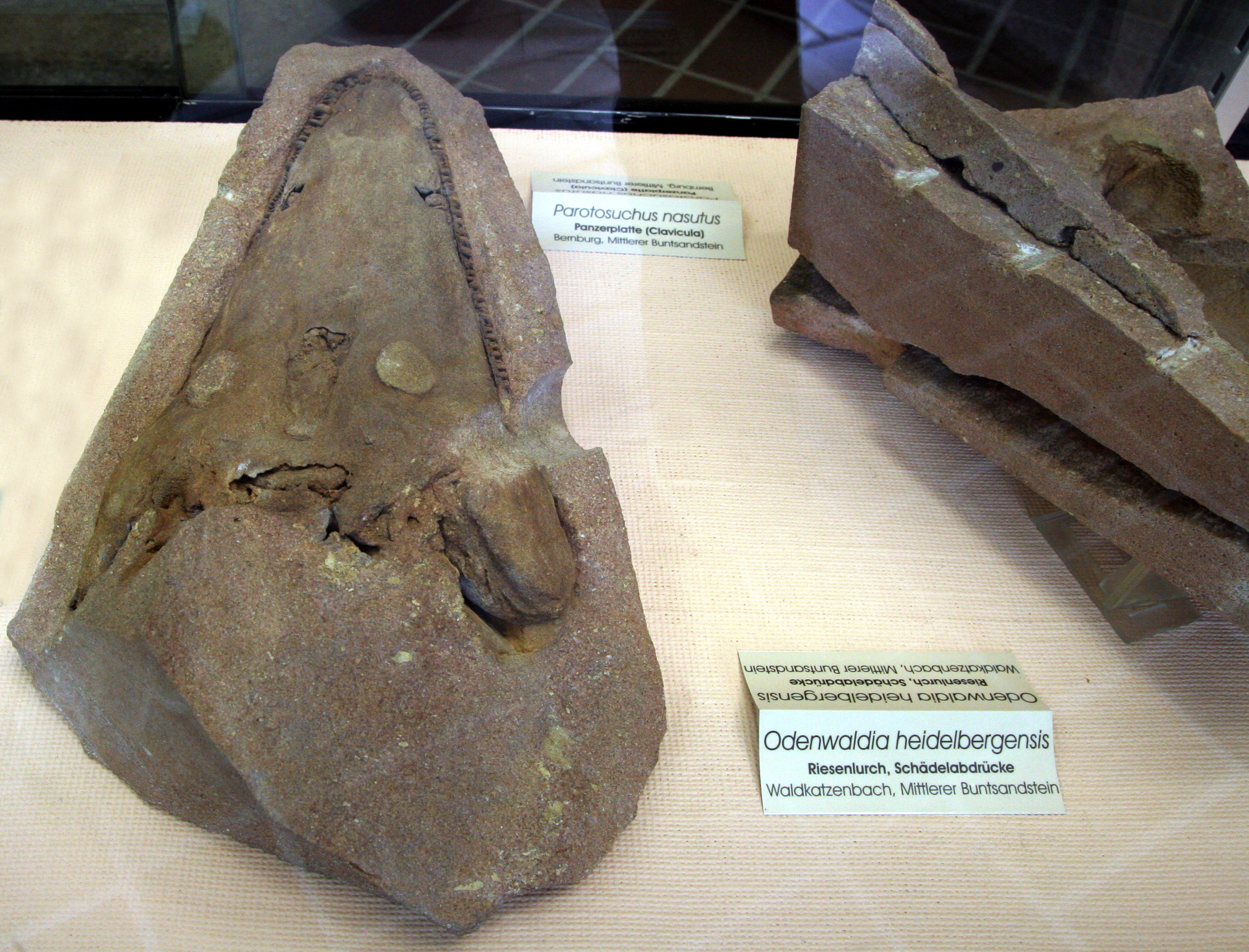 Schädelabdruck eines Riesenlurchs (Odenwaldia heidelbergensis) in Buntsandstein. Fundort Waldkatzenbach. Der Abdruck befindet sich im Museum des Institutes für Geowissenschaften an der Ruprecht-Karls-Universität in Heidelberg (Im Neuenheimer Feld 234) [1]